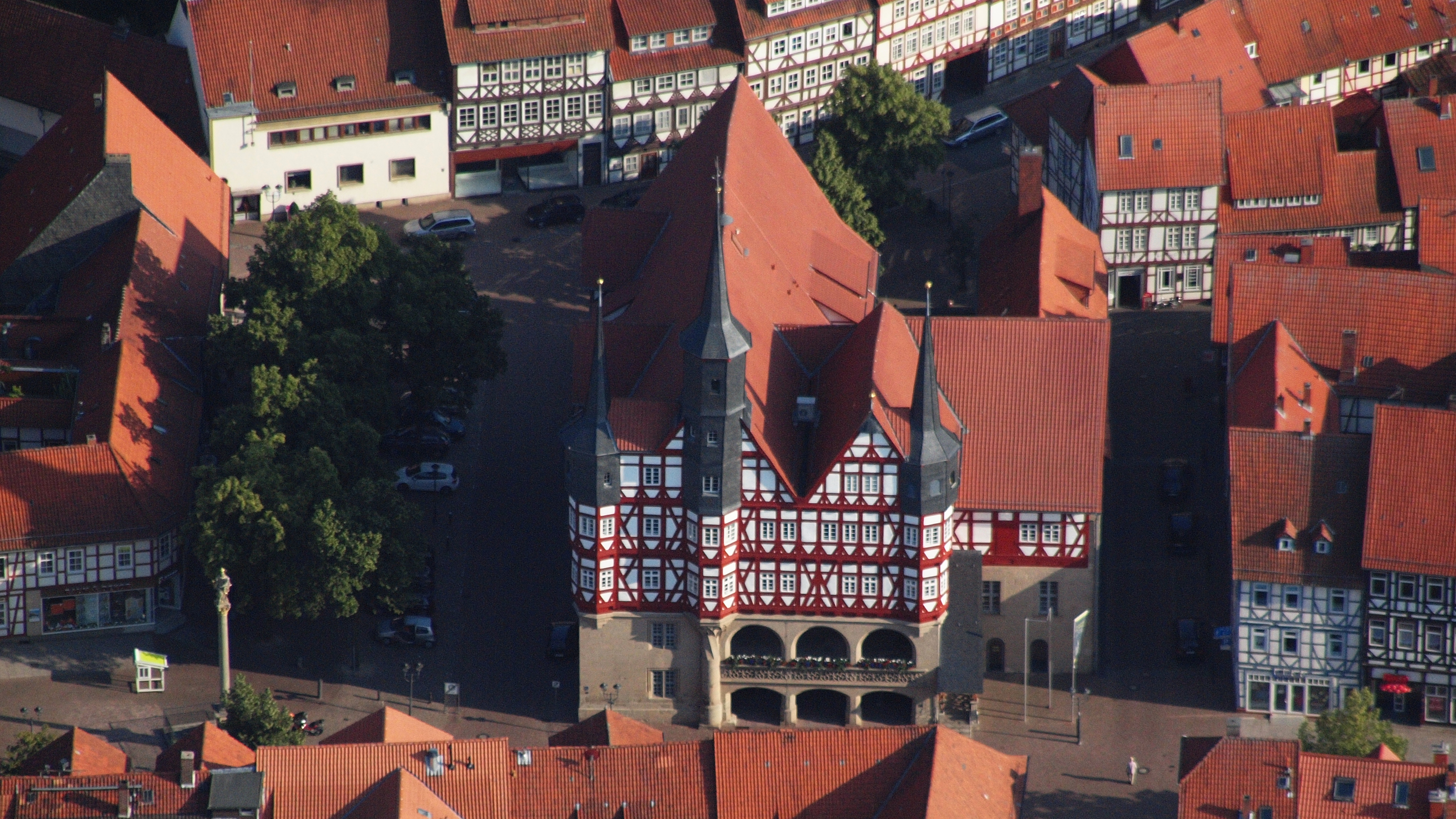 Duderstadt – Rathaus: Luftaufnahme